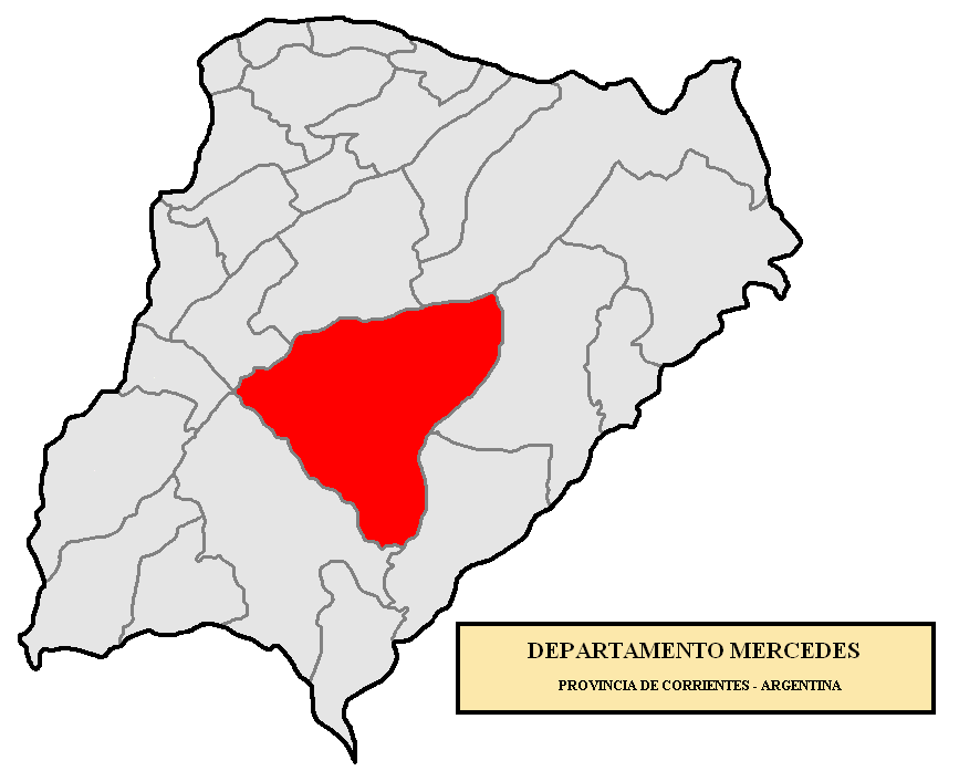 Localización del Departamento Mercedes en la provincia de Corrientes, Argentina Localización del Departamento Mercedes, en la provincia de Corrientes, Argentina.